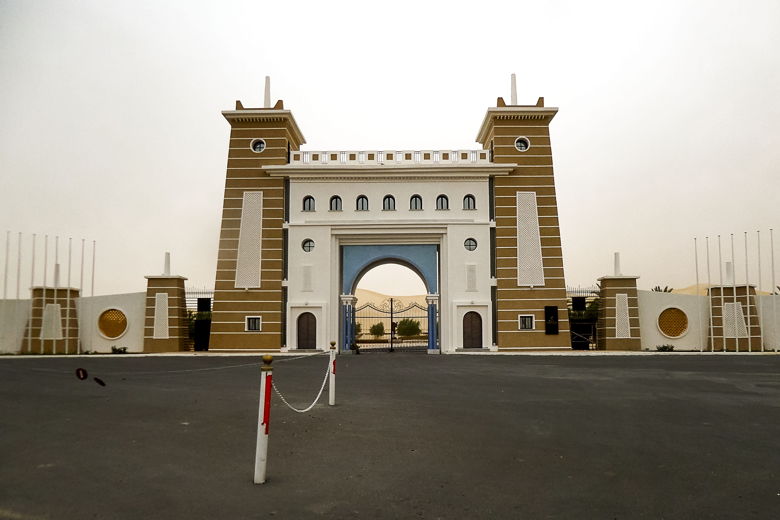 Oued Souf واد سوف Wilaya d'El Oued ولاية الوادي